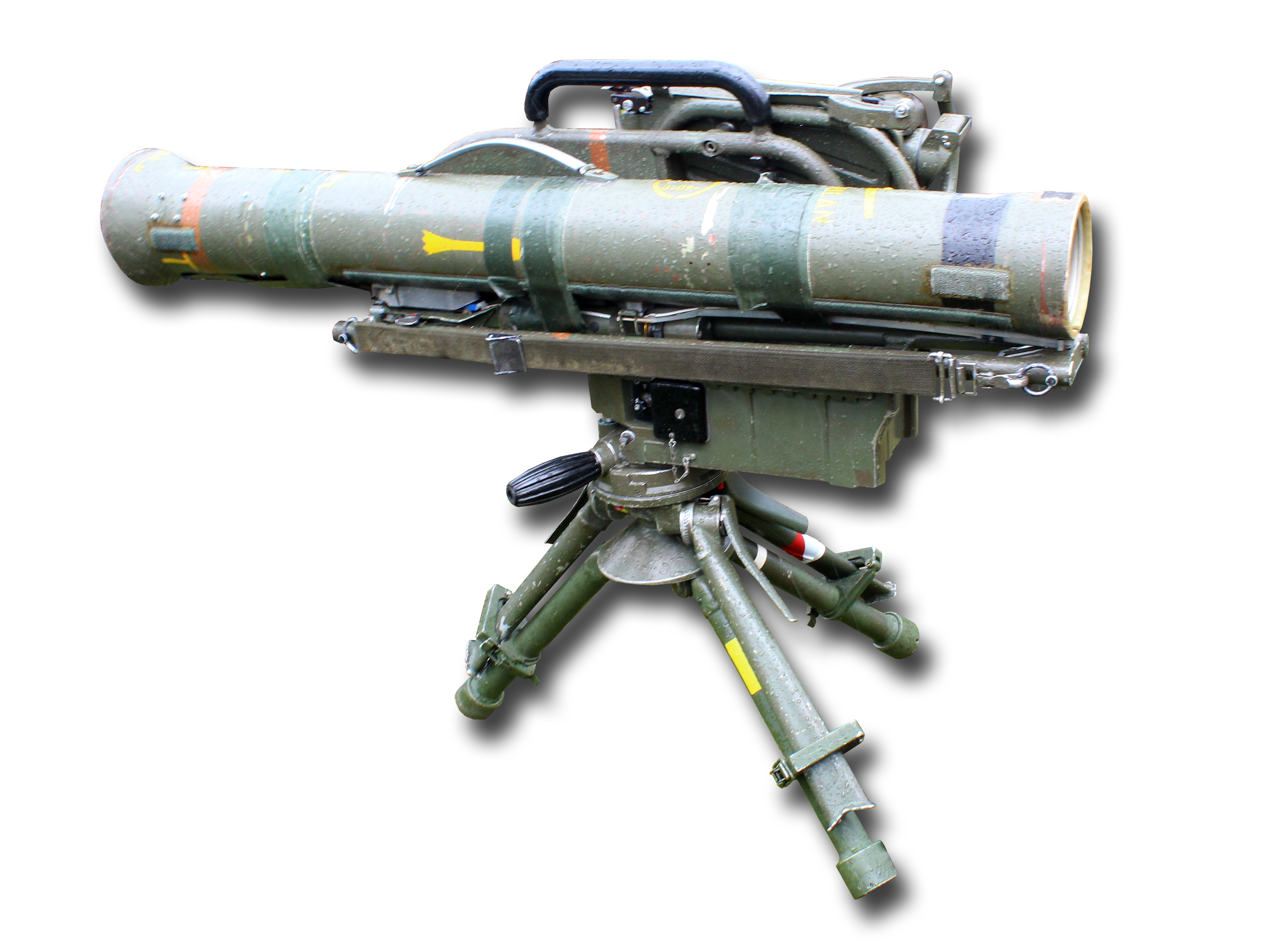 MILAN beim Tag der Bundeswehr 2019 in Jagel